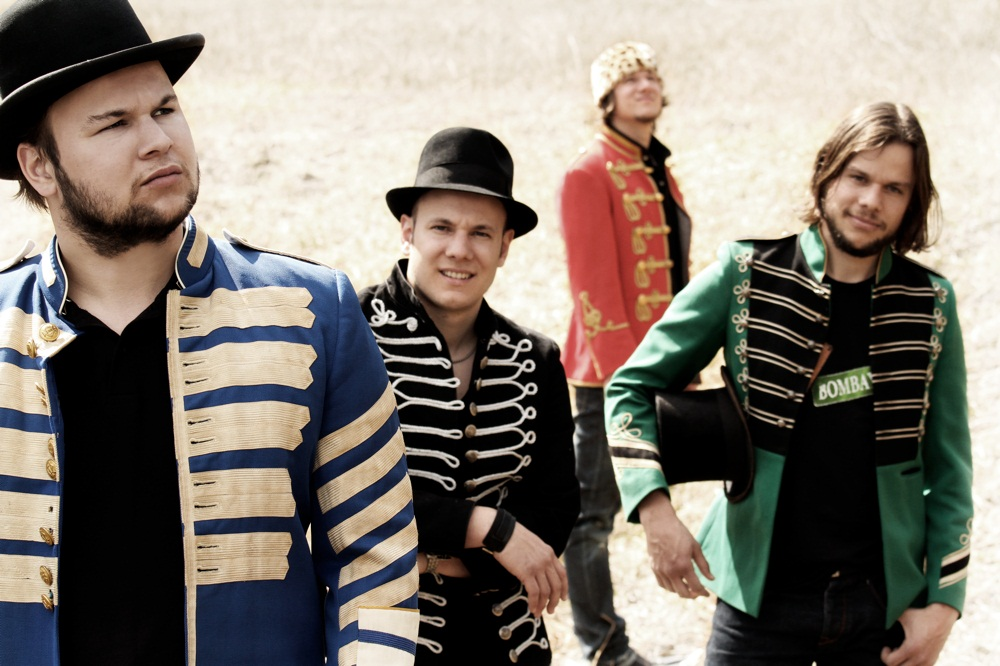 77 Bombay Street Česky: Folk-rocková kapela 77 Bombay Street, zleva: Esra, Joe, Simri-Ramon a Matt.